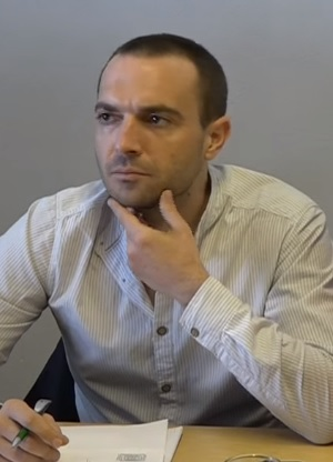 Luis Alegre, 2015.